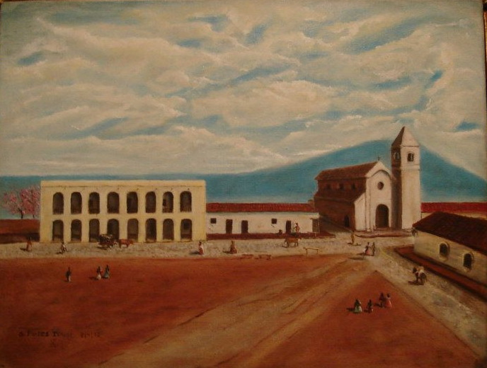 "TUCUMAN 1812" Oleo de Gerardo Flores Ivaldi que representa la esquina de 25 de mayo y San Martín hacia el año 1812. Se pueden ver la antigua iglesia de San Francisco y el cabildo de Tucumán que aun no llegaba hasta la esquina. La actual Plaza Independencia no era mas que un descampado. A la izquierda del cabildo estaba el "hueco del ahorcado"